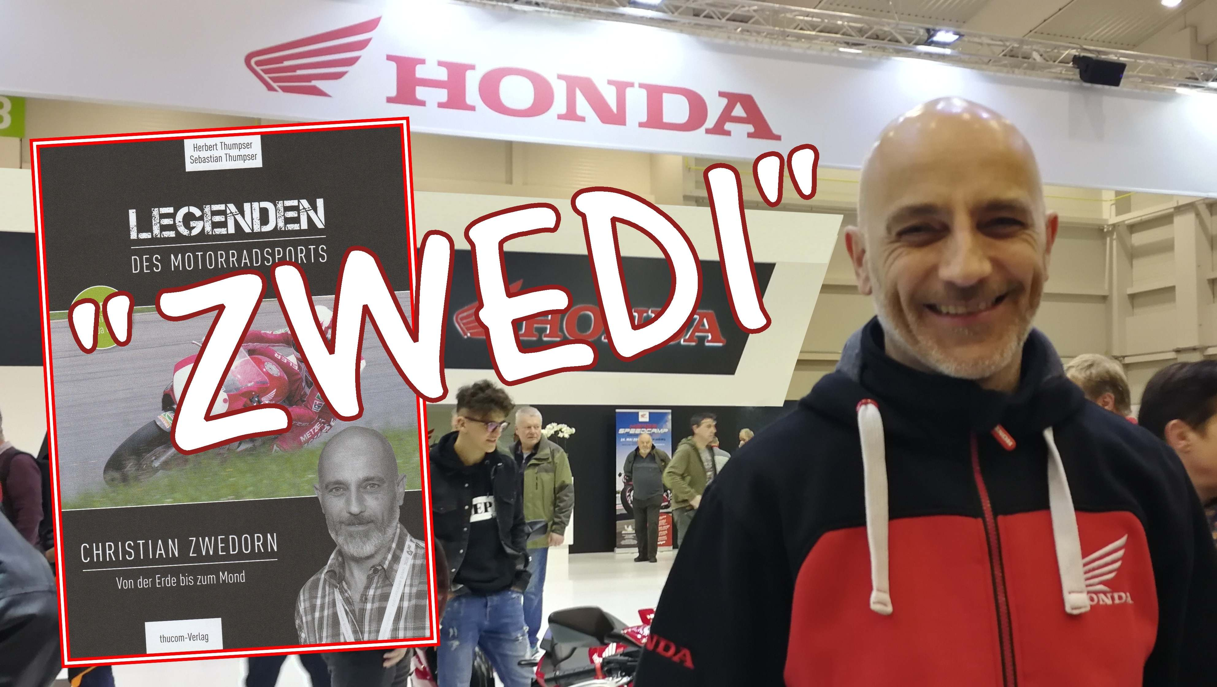 ... HONDA Stand